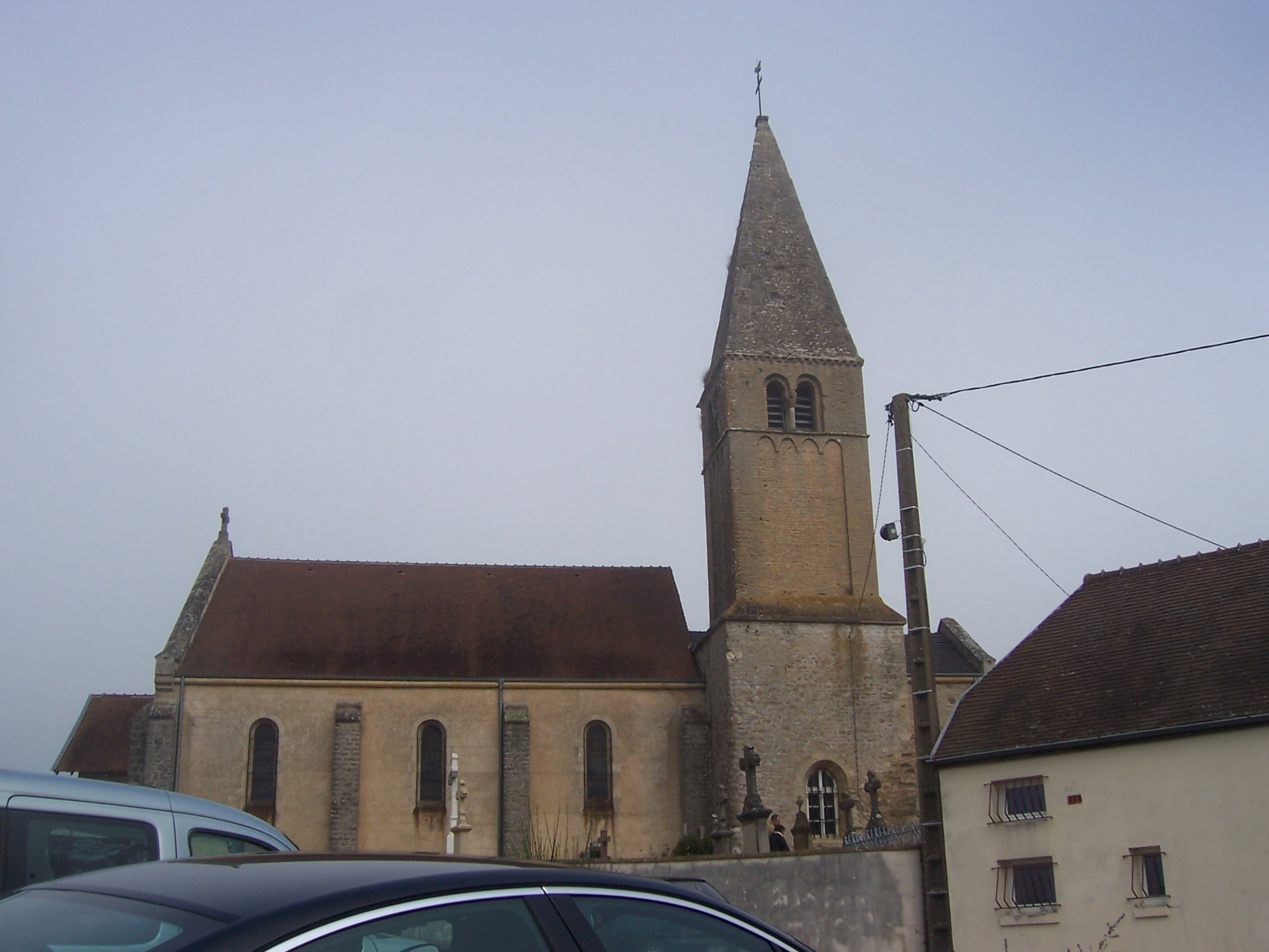 Eglise de Saint-Micaud